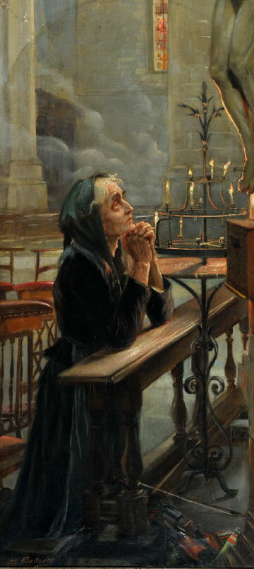 Auf Kniebank betende Frau in der Kirche, Öl/Lwd, 113 x 52 cm, unten links signiert, datiert 1897